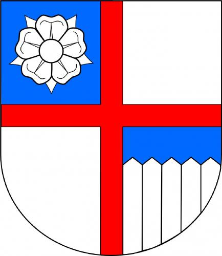 znak , Slavhostice, okres Jičín